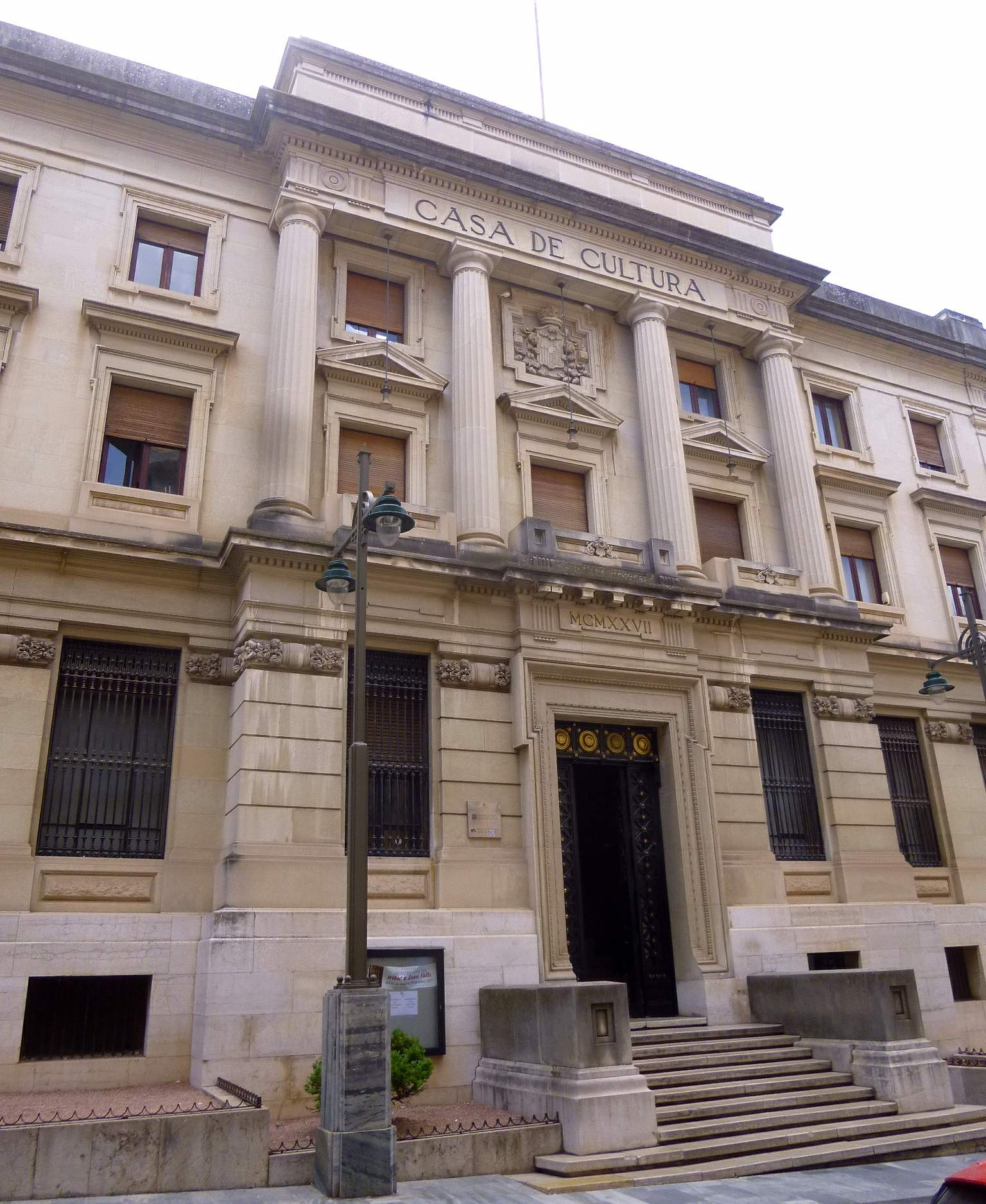 Alcoy - Centre Cultural Mario Silvestre